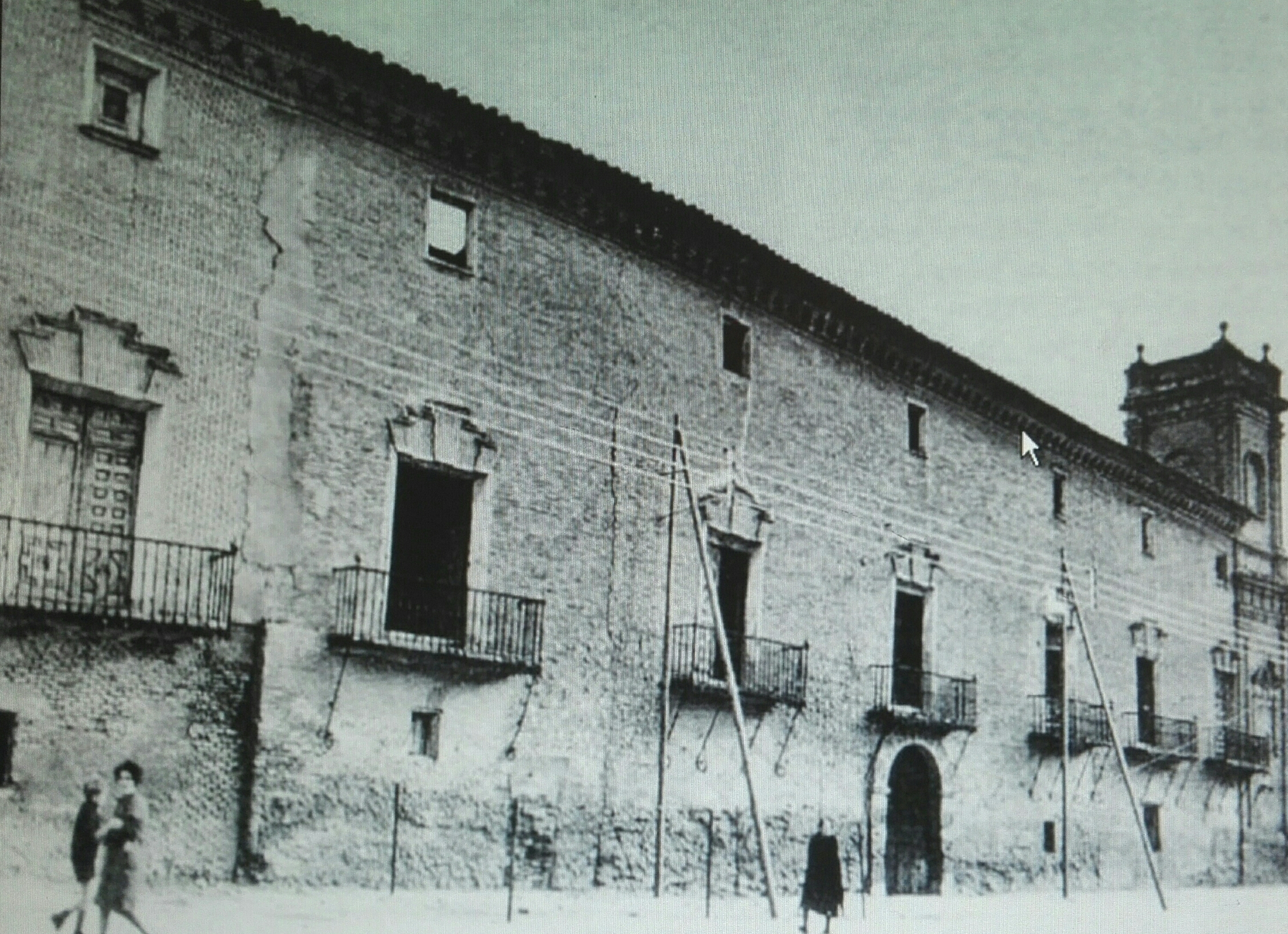 Palacio Cabo e la Armería del Señorío de Valtierra. Postal de Principios del Siglo XX.